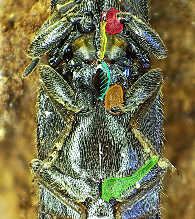 Athous bicolor, Ausschnitt Unterseite, rechts teilweise koloriert: rot: Praecoxa braun: Mesocoxa grün: Metacoxa gelb: Prosternalfortsatz türkis:Aussparung der Mittelbrust